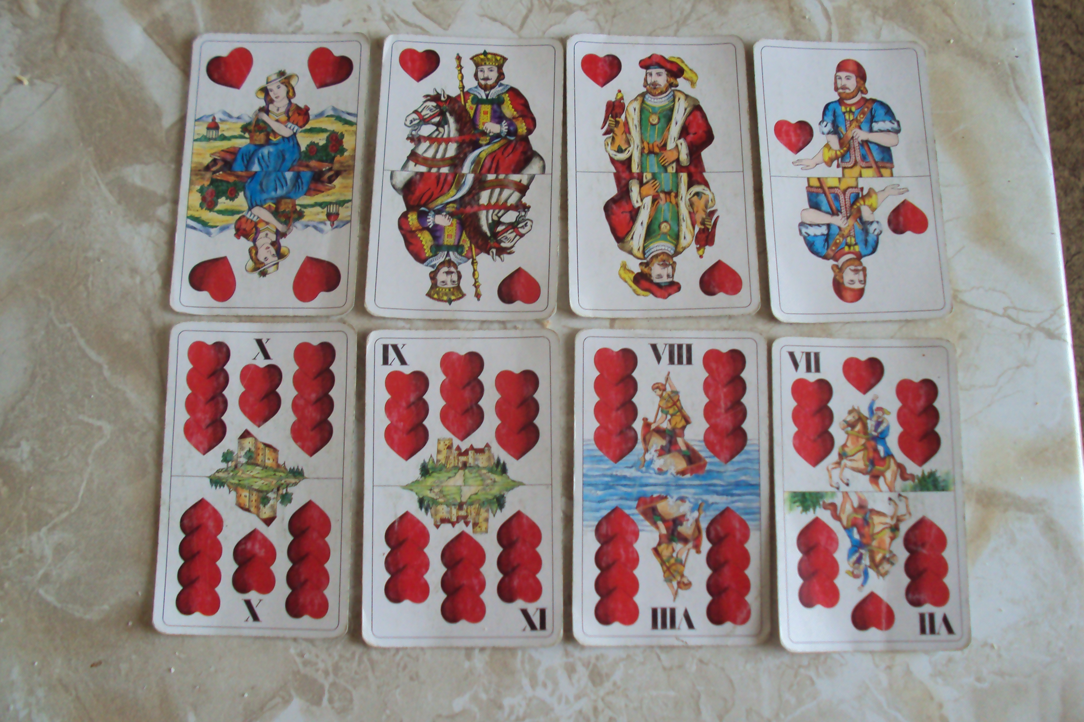 Německé karty v červené barvě